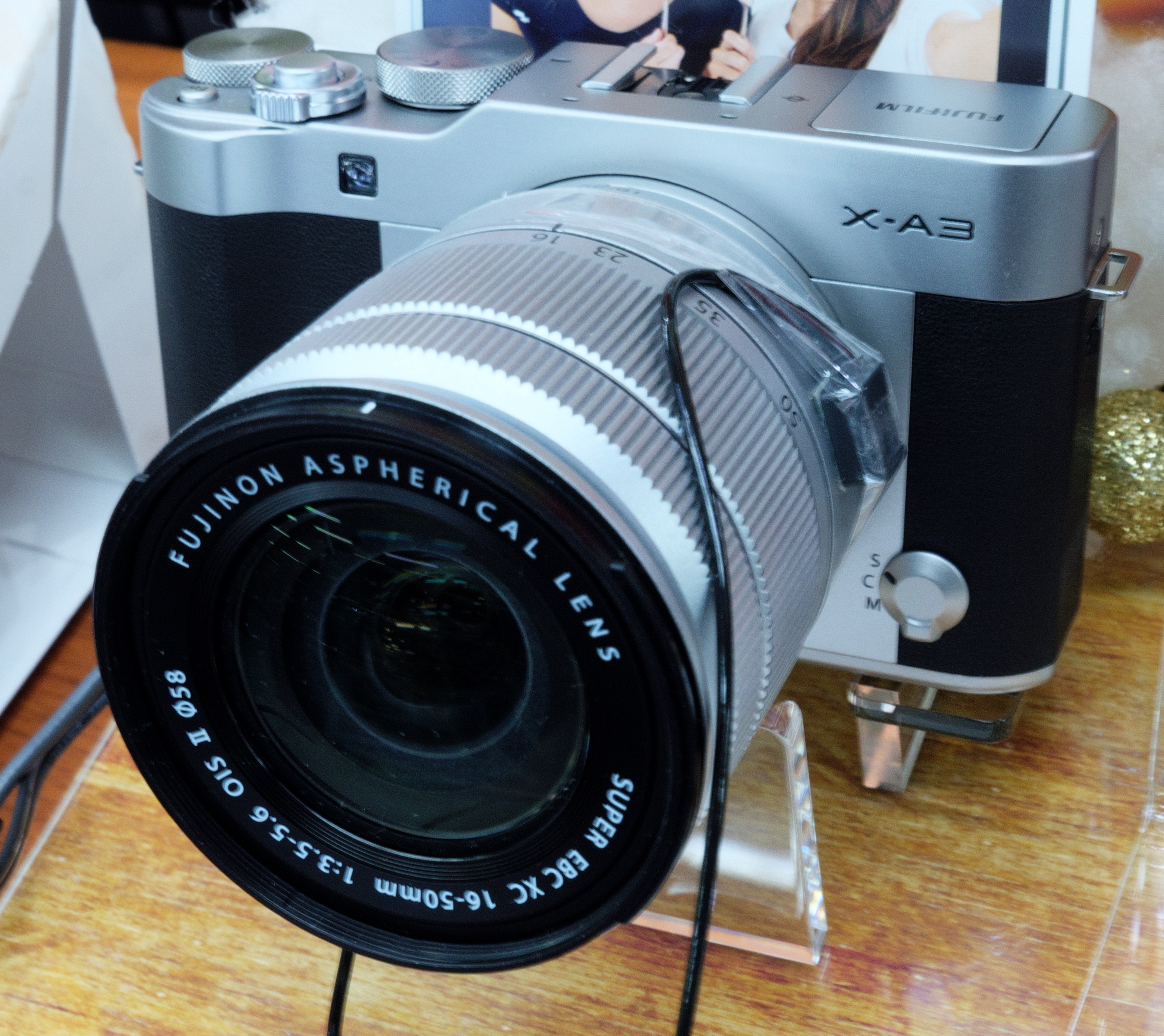 FUJIFILM X-A3（ヨドバシカメラにて撮影）